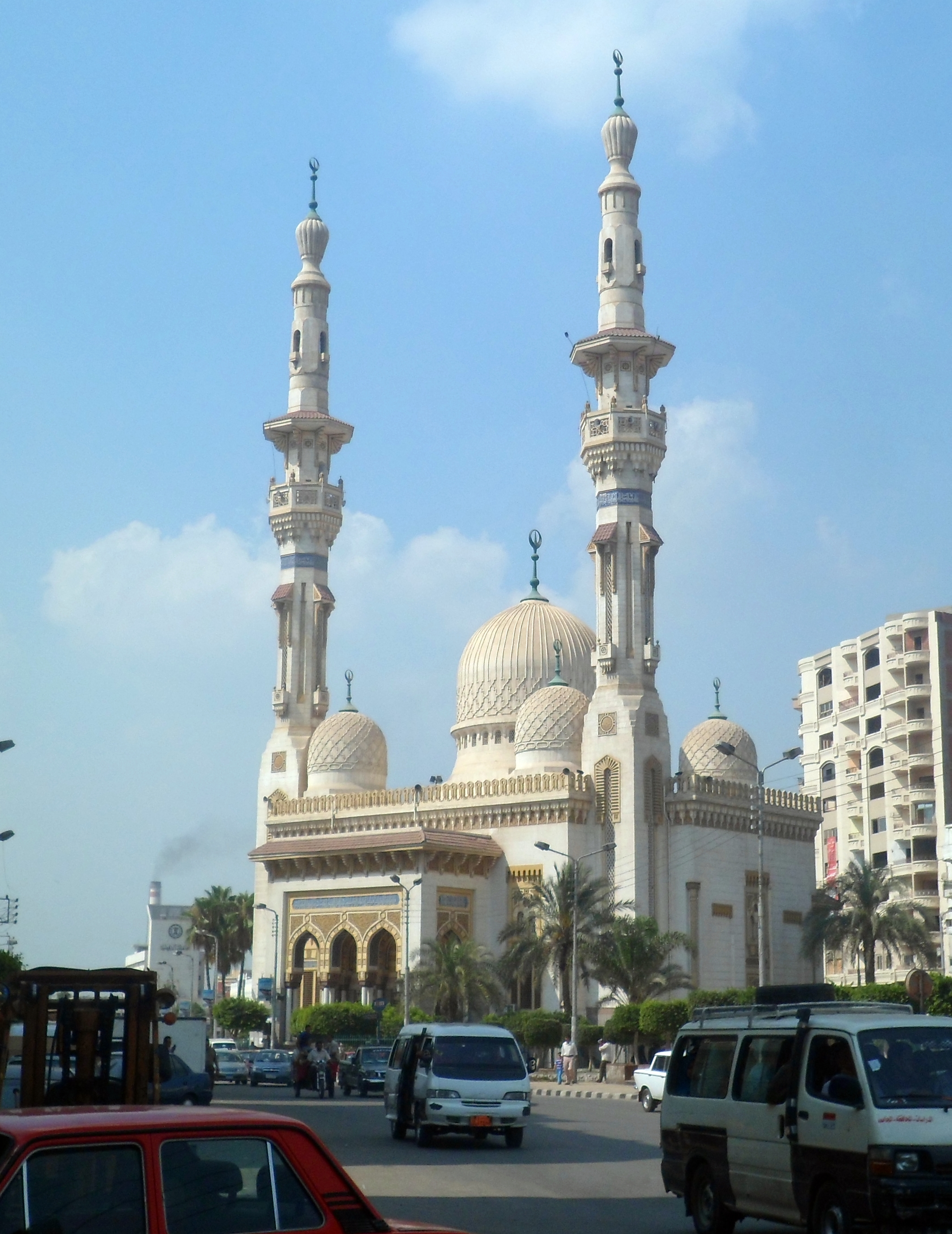 مسجد المحافظة، المنصورة